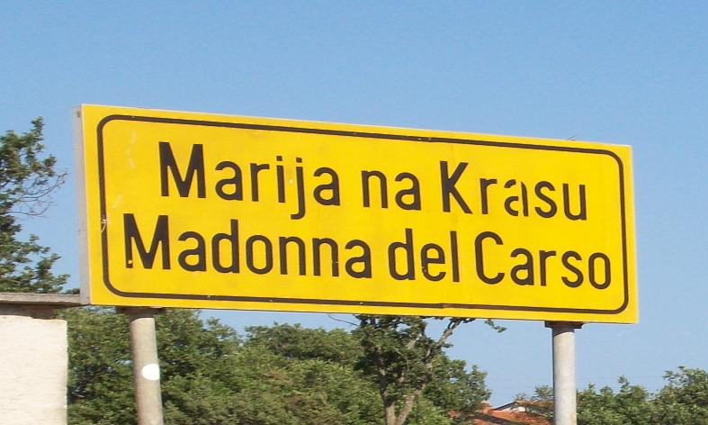 Marija na Krasu / Madonna del Carso (Croatia) - bilingual